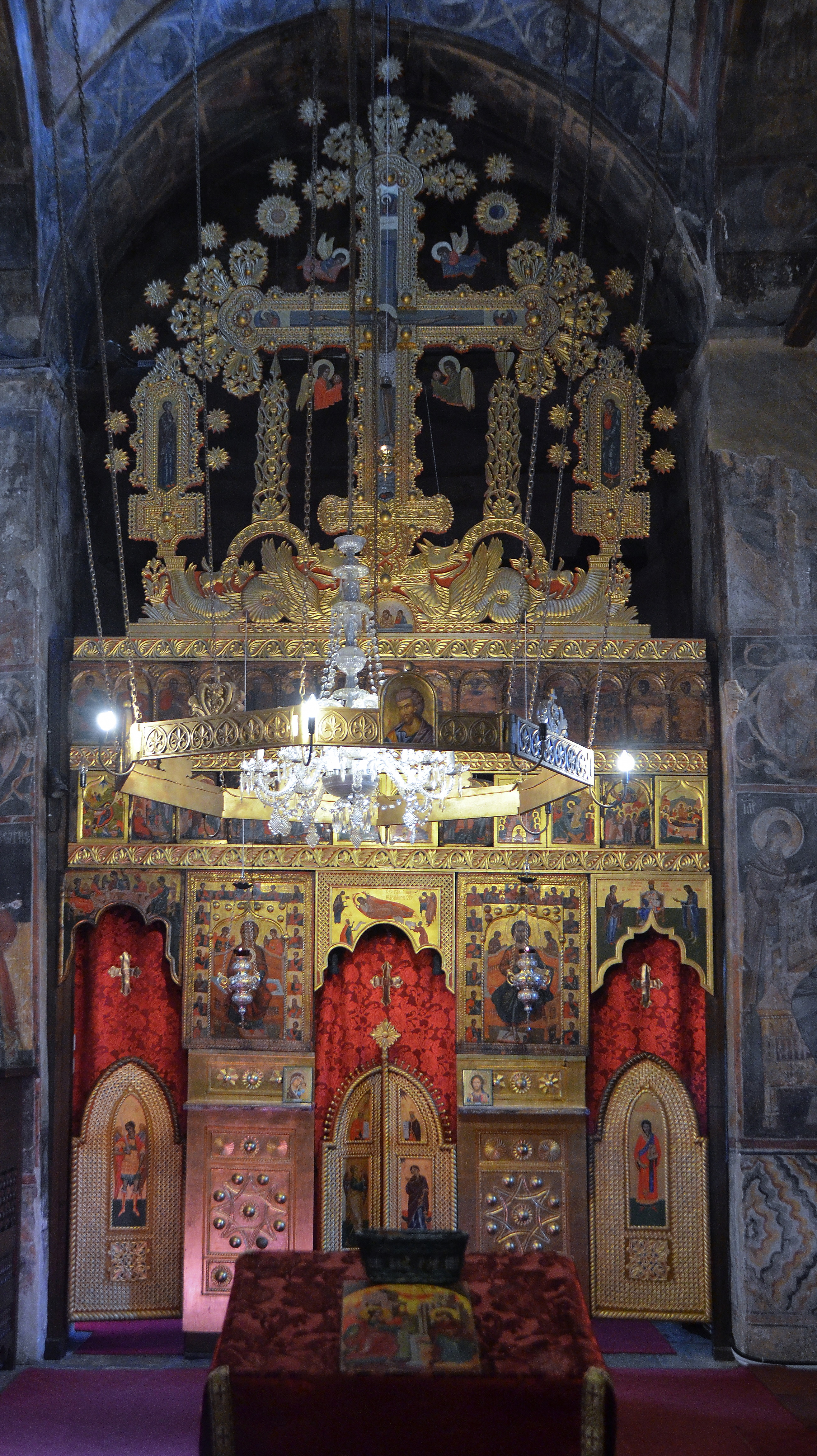 Посебну вредност упечатљивог црквеног ентеријера представља репрезентативан позлаћени иконостас у дуборезу из 17. века.